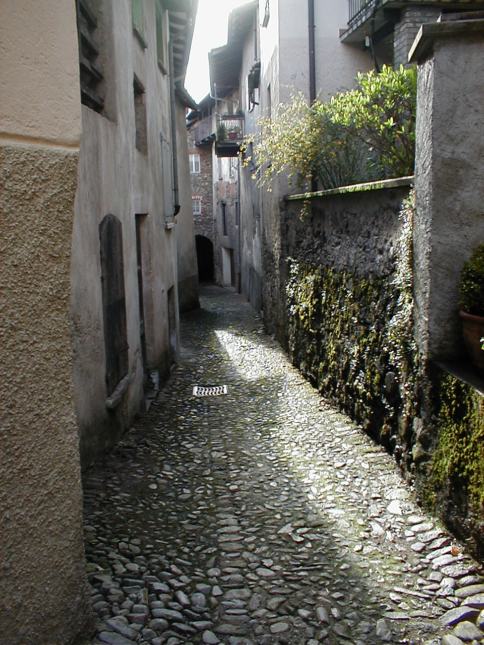 Malerische Gasse in Bedigliora. Foto vom Verfasser aufgenommen am 21. 04. 2003.